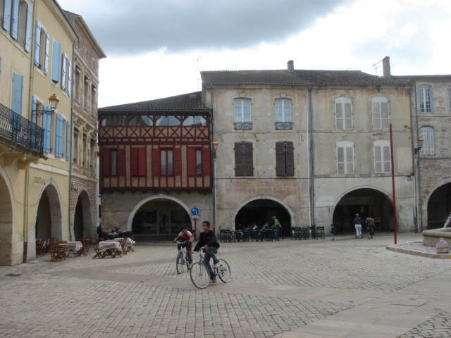 Deux enfants faisant du velo sur la place de Villeneuve-sur-Lot